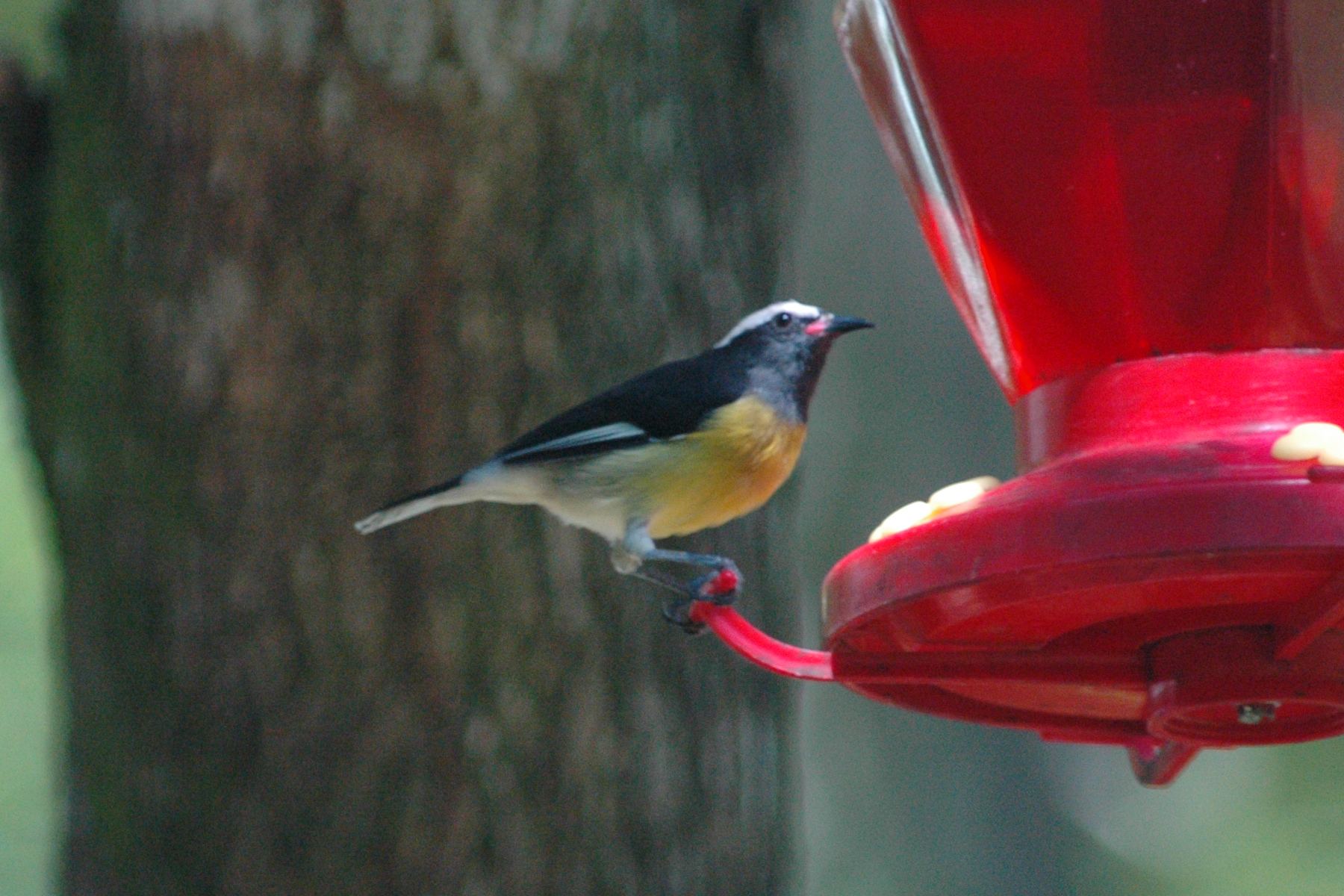 Bananaquit Coereba flaveola flaveola, Orange Bay, Hanover, Jamaica.